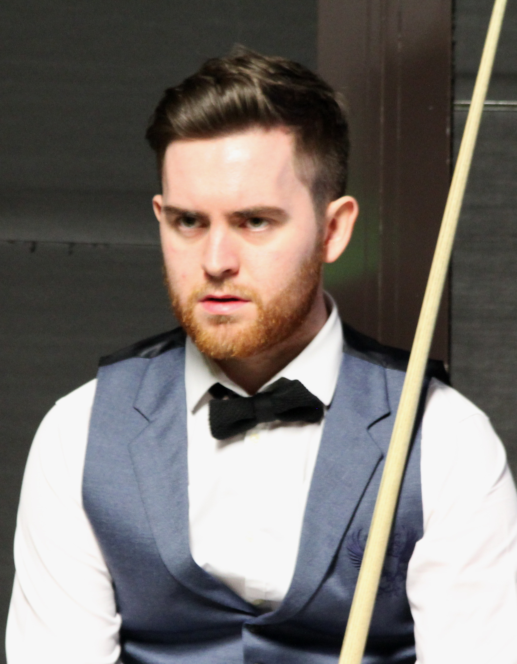 Jak Jones beim Paul Hunter Classic 2016